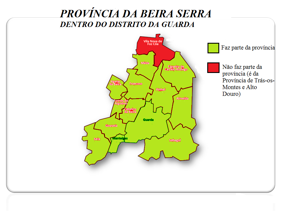 Território, dividido em concelhos, da proposta Província da wp:pt:Beira Serra dentro do território do wp:pt:Distrito da Guarda (a verde; a vermelho, concelho que não faz parte da proposta).